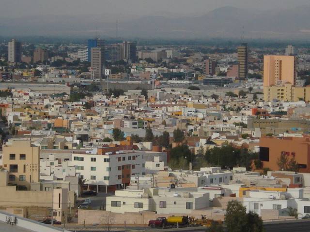 Vista parcial de la ciudad de San Luis Potosí